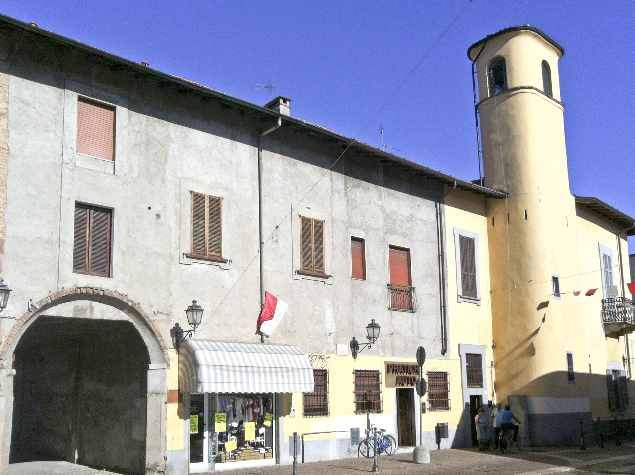 Palazzo Dugnani a Cornaredo. L'impianto del palazzo risale al seicento. dall'impianto seicentesco, di semplice fatturaè completato da un'alta torretta belvedere.